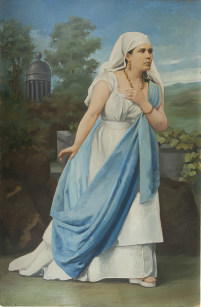 Copia positiva. Amalia Ramírez en el Moises de Rossini.